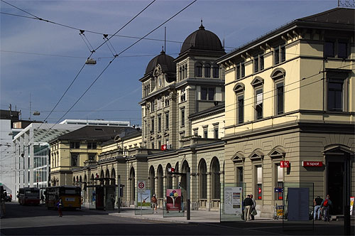 Bahnhof in Winterthur (Nr. 03.1-5432)